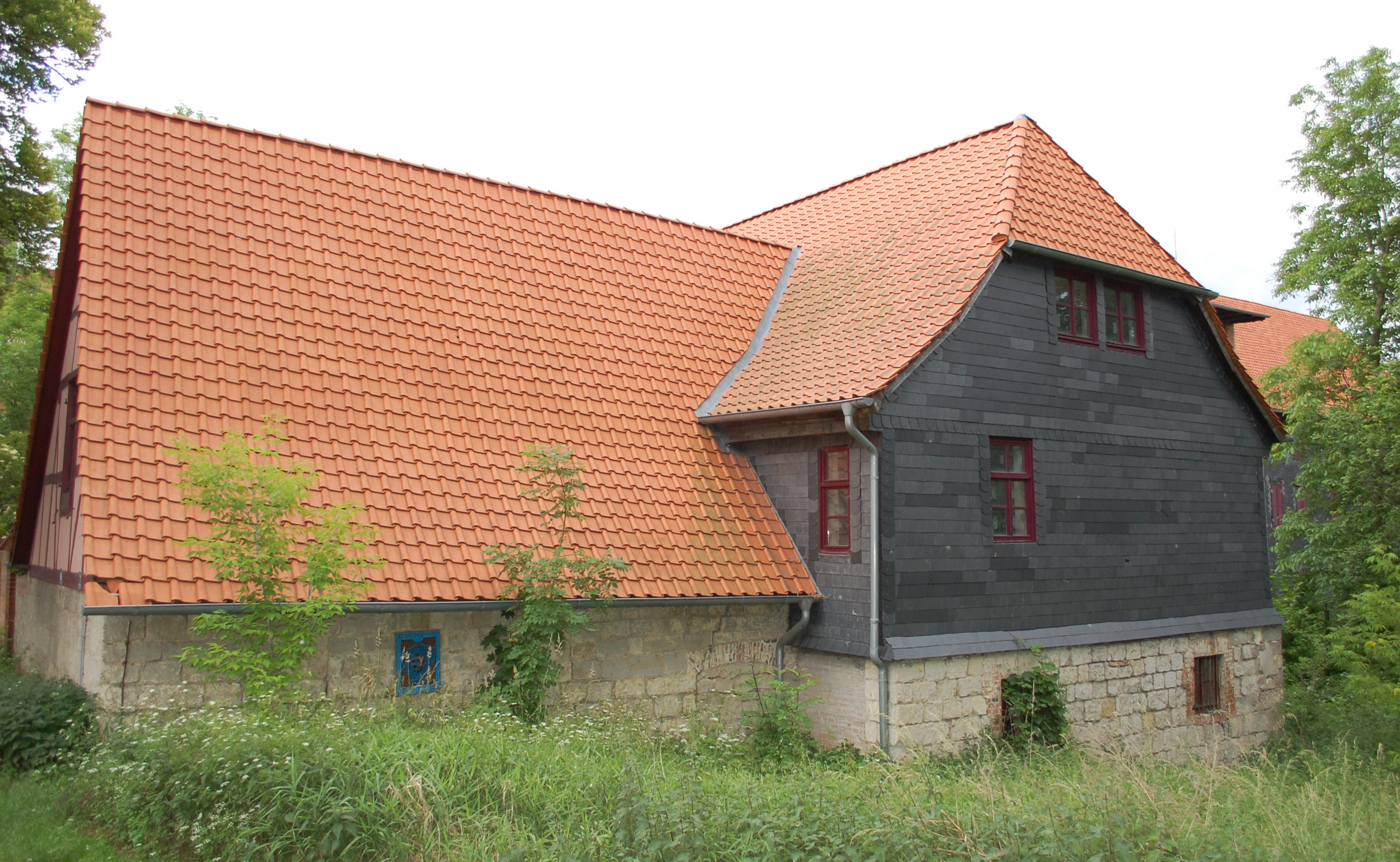 Haus Mühlenstraße 26 in Quedlinburg